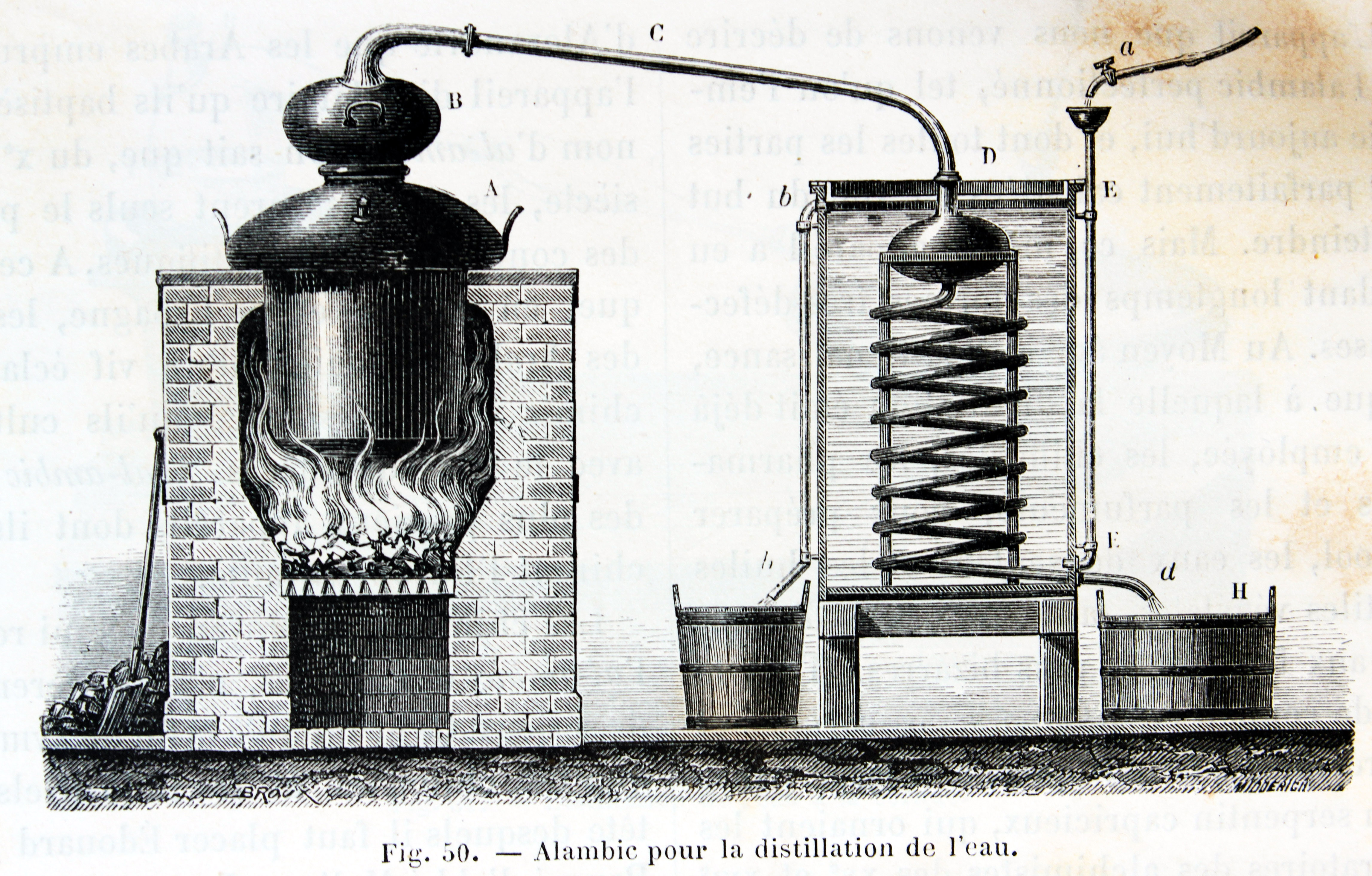 Ilustraciones de la obra : Les merveilles de l'industrie ou, Description des principales industries modernes / par Louis Figuier. - Paris : Furne, Jouvet, [1873-1877]. - Tome III